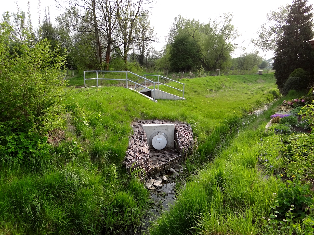 Überlauf und Auslauf des Hochwasserrückhaltebeckens in der kleinen Mittelriede bei der Straße Kälberwiese. Der Bach fließt rechts auf den Betrachter zu, im Vordergrund ist der Auslass des Beckens, dahinter der Dammbalkenverschluss zu sehen.